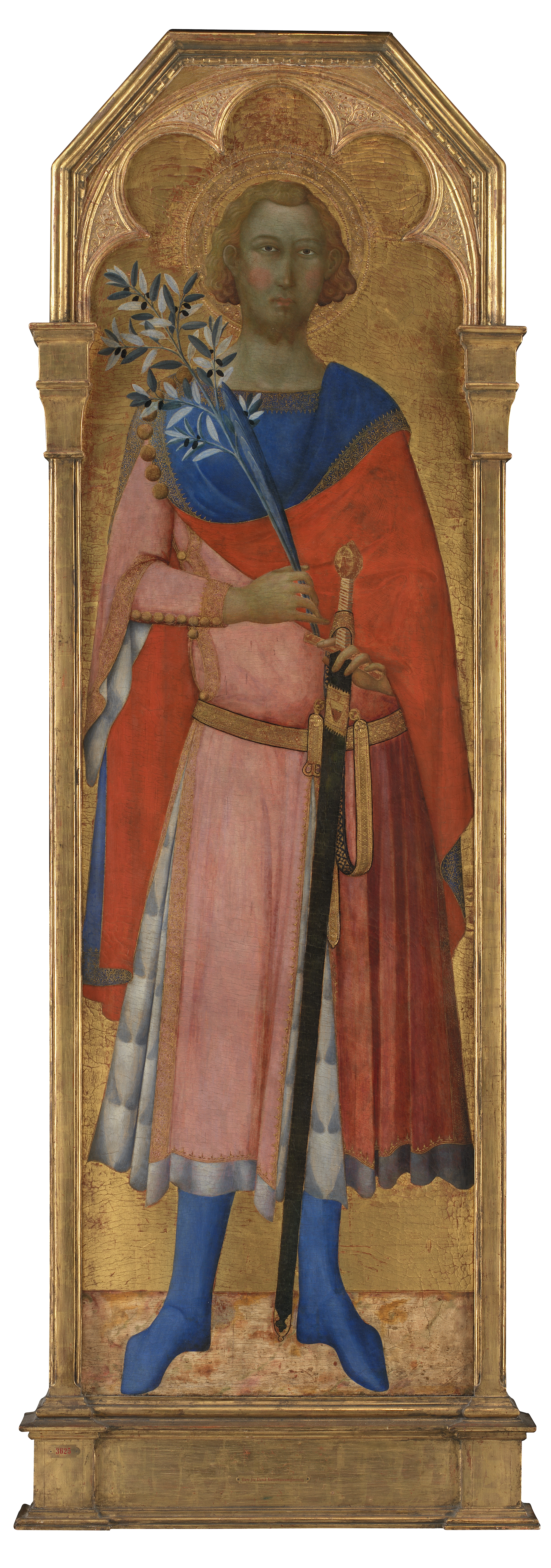 Skt. Victor af Siena. Ca 1350. del af altertavle